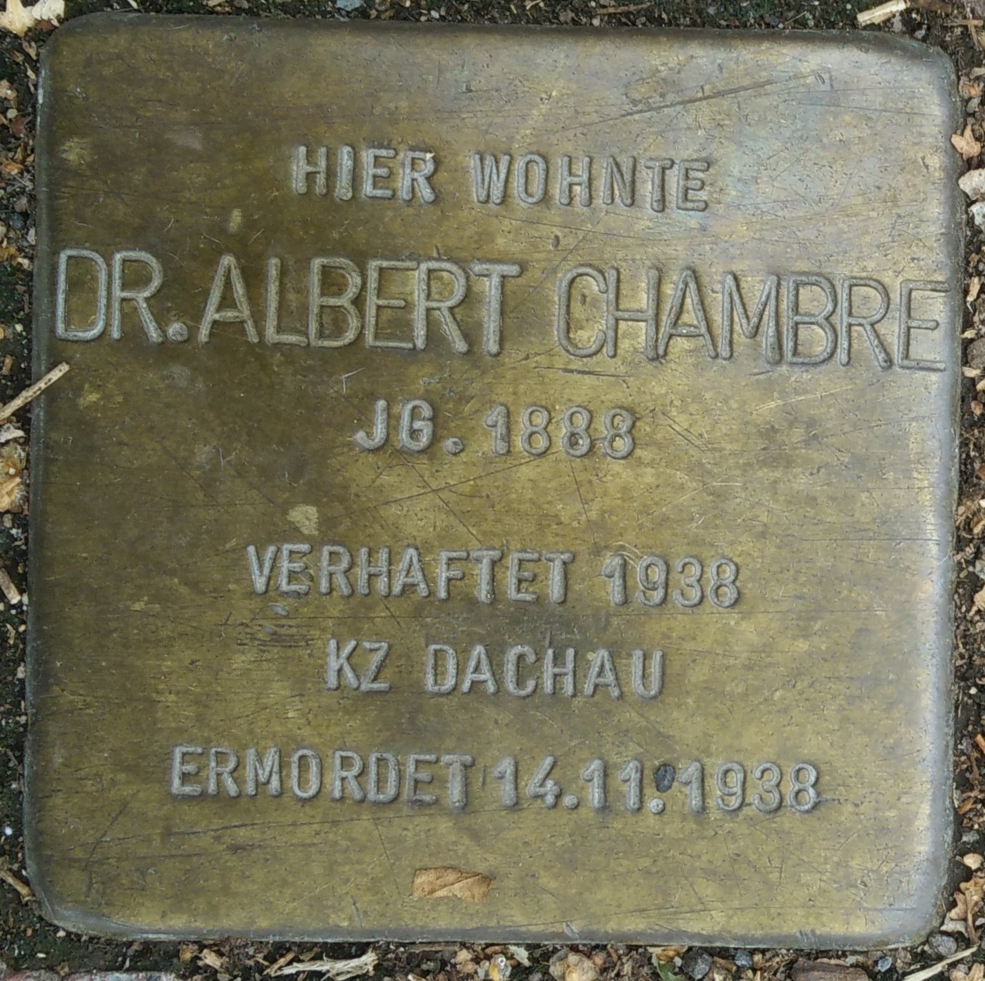 Bad Vilbel, Stolperstein Dr. Albert Chambre